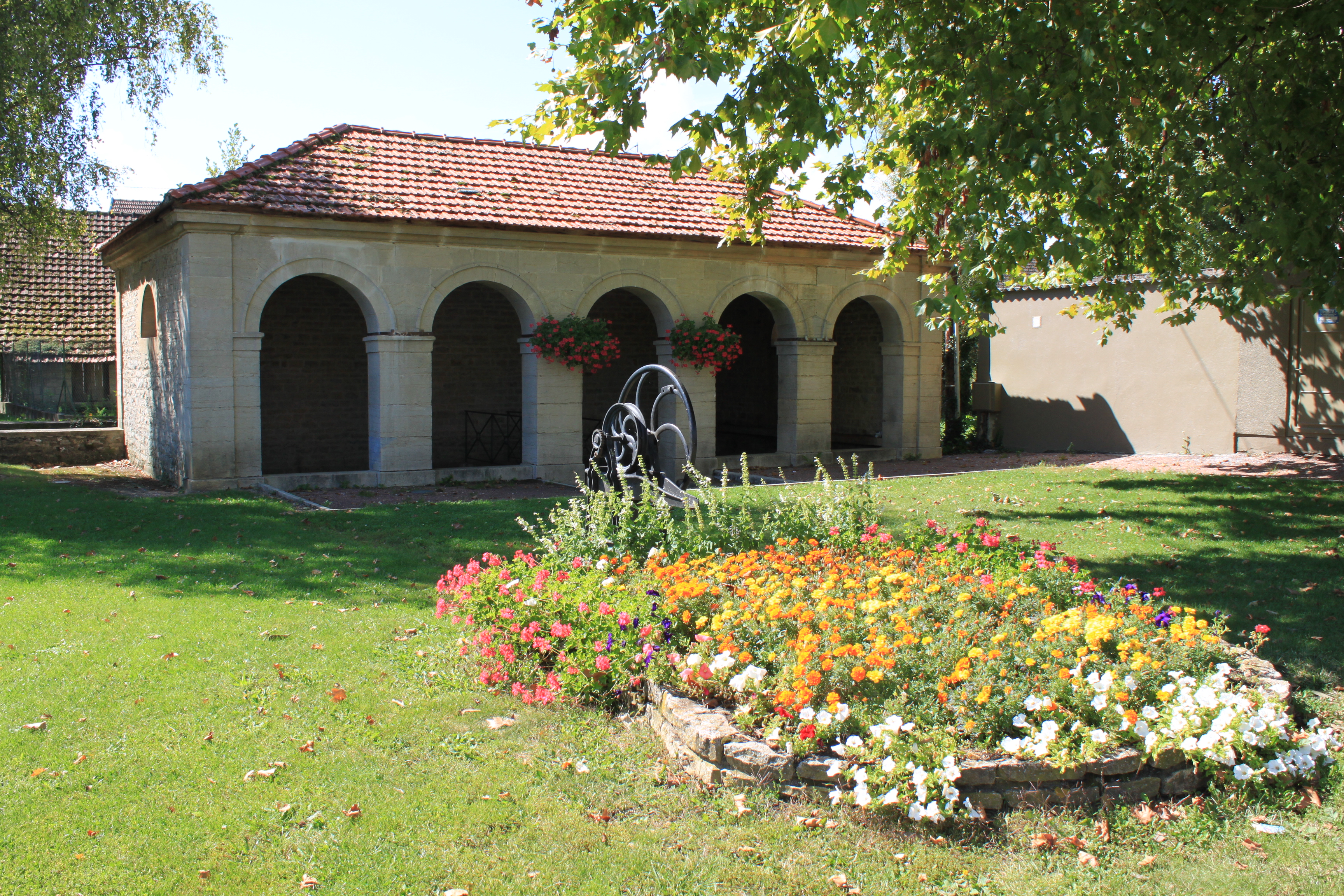 Ouges, Bourgogne, France